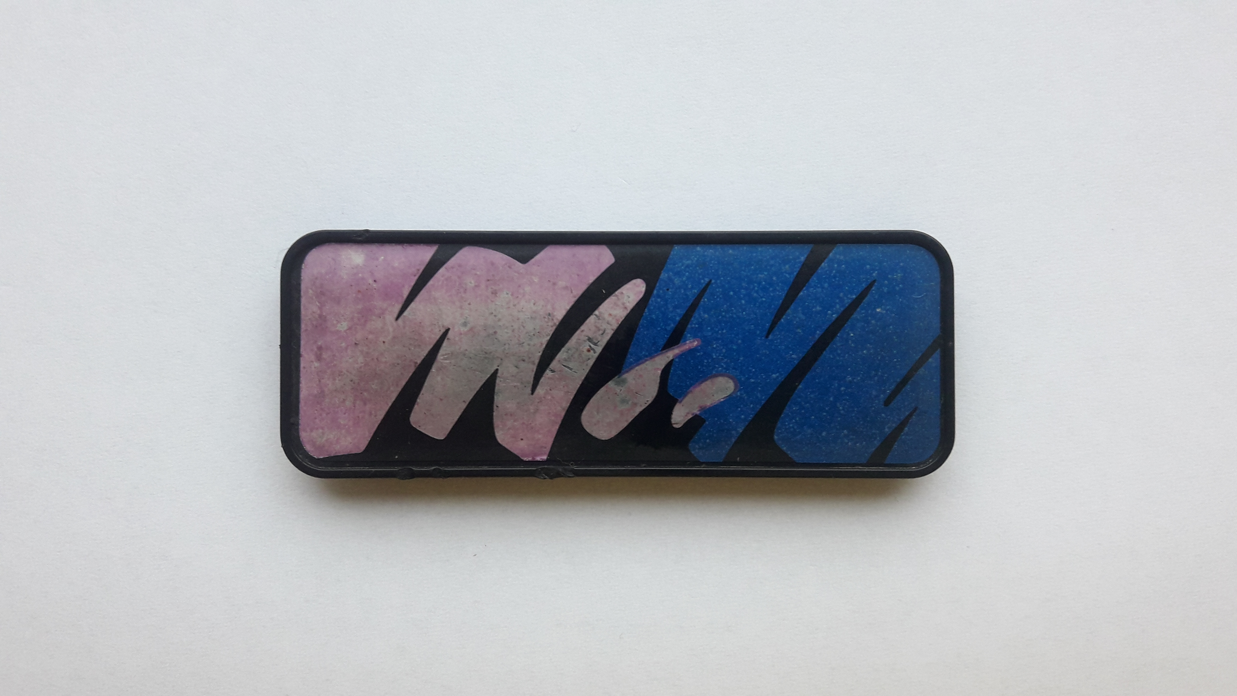 samsung 20180319 171452